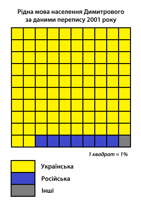 Інфографіка розподілу населення смт Димитрове Олександрійської міськради за рідною мовою згідно з даними перепису 2001 року. Джерело: Розподіл населення Кіровоградської області за рідною мовою (у % до загальної чисельності населення) за переписом 2001 року